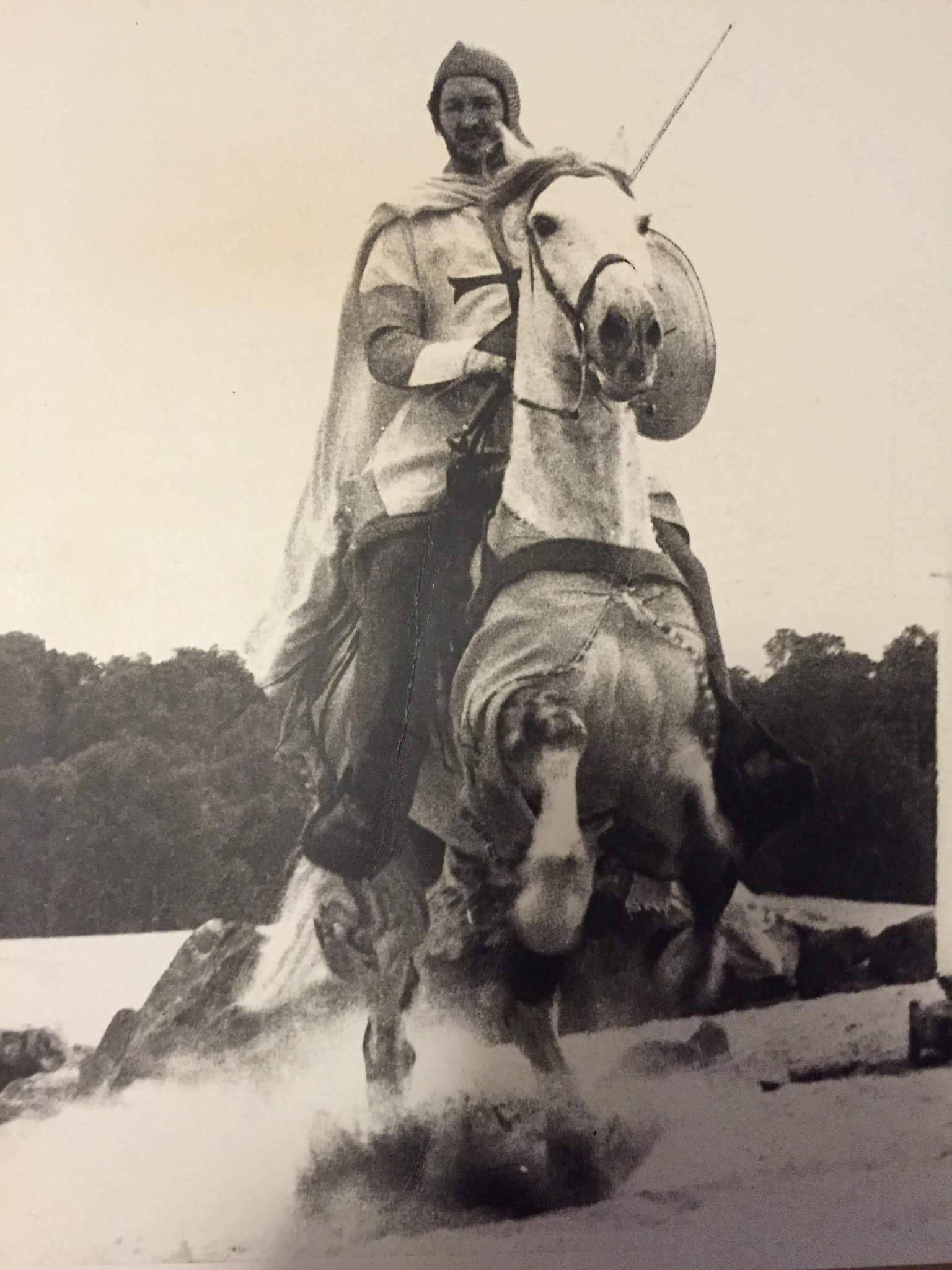 André Cagnard dans "Le dernier des templiers"